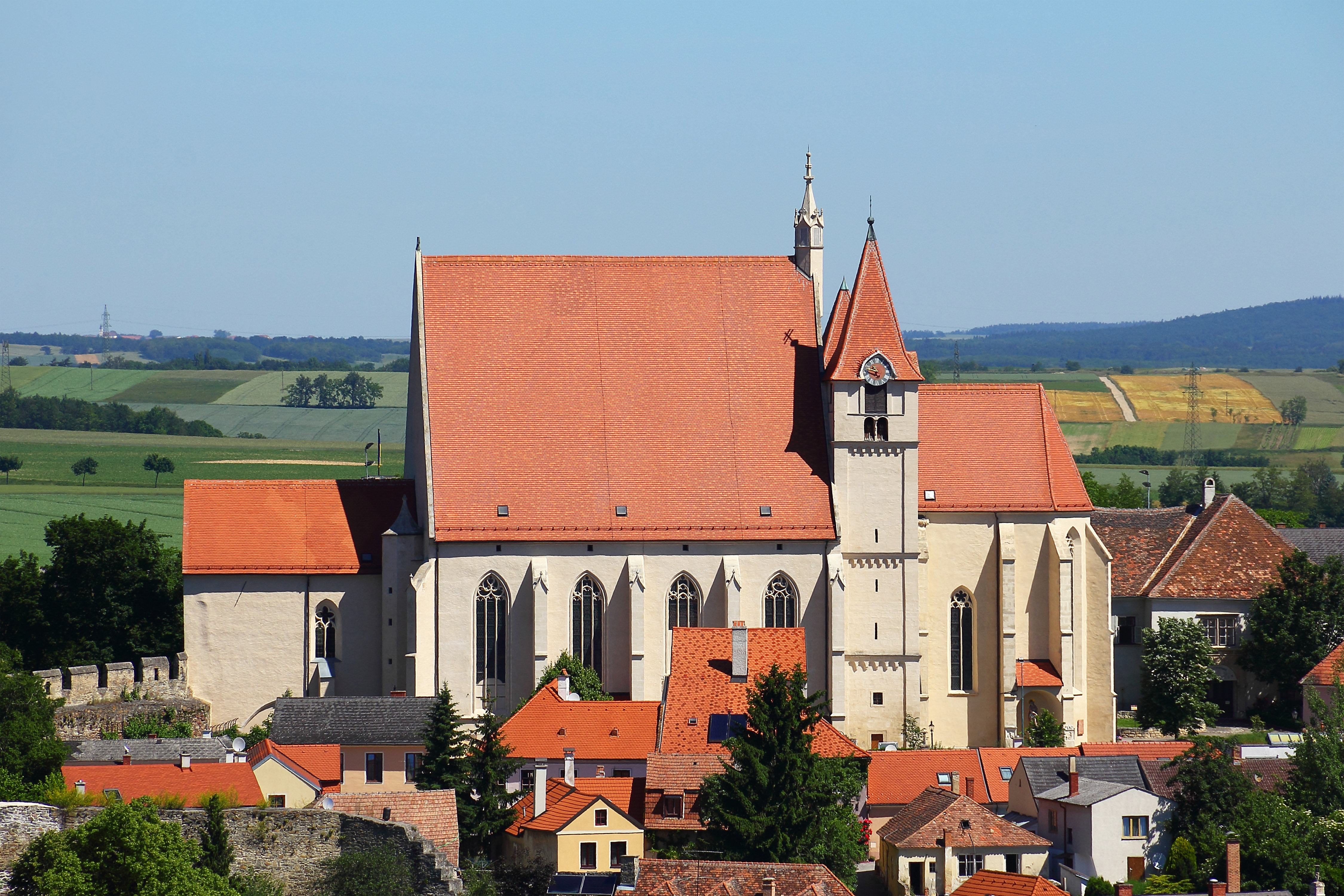 Die weithin sichtbare und die Stadt überragende Pfarrkirche hl. Stephanus, ursprünglich westlich außerhalb der Stadt gelegen und von einem ummauerten, ehemaligen Friedhof umgeben, hat ein spätgotisches, von einem hohen Satteldach überdecktes Langhaus und einen von romanischen Türmen flankierten hochgotischen Chor.